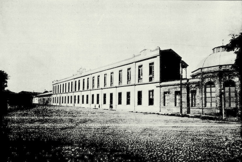 Imagen en Chile descripción física, política, social industrial y comercial de la República de Chile, por Carlos Tornero.1903